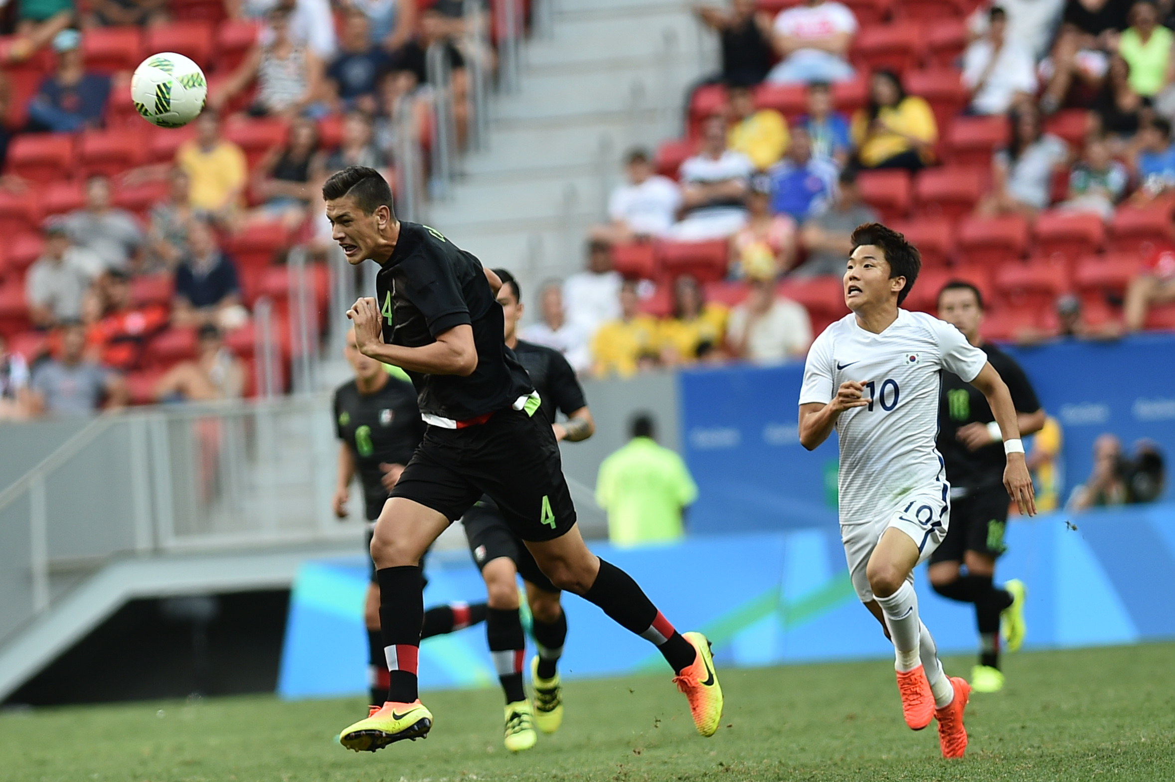 Estádio Nacional de Brasília Mané Garrincha, Brasília, DF, Brasil, 10/8/2016 Foto: Andre Borges/Agência Brasília Coréia do Sul e México jogam nesta quarta-feira (10), no Estádio Mané Garrincha, pelo grupo C do futebol masculino nas Olimpíadas 2016.